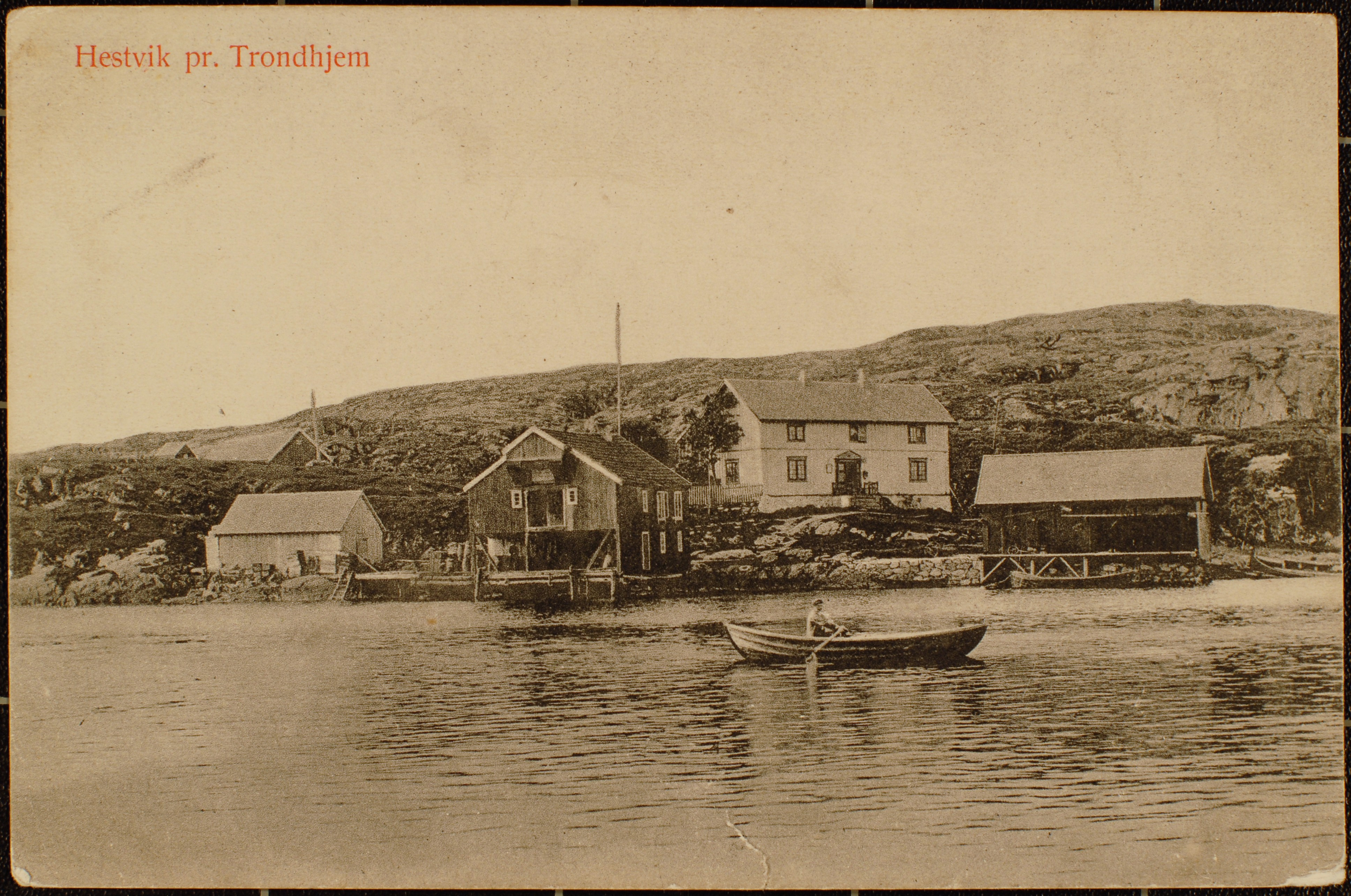 Hestvika in Hitra, Norway